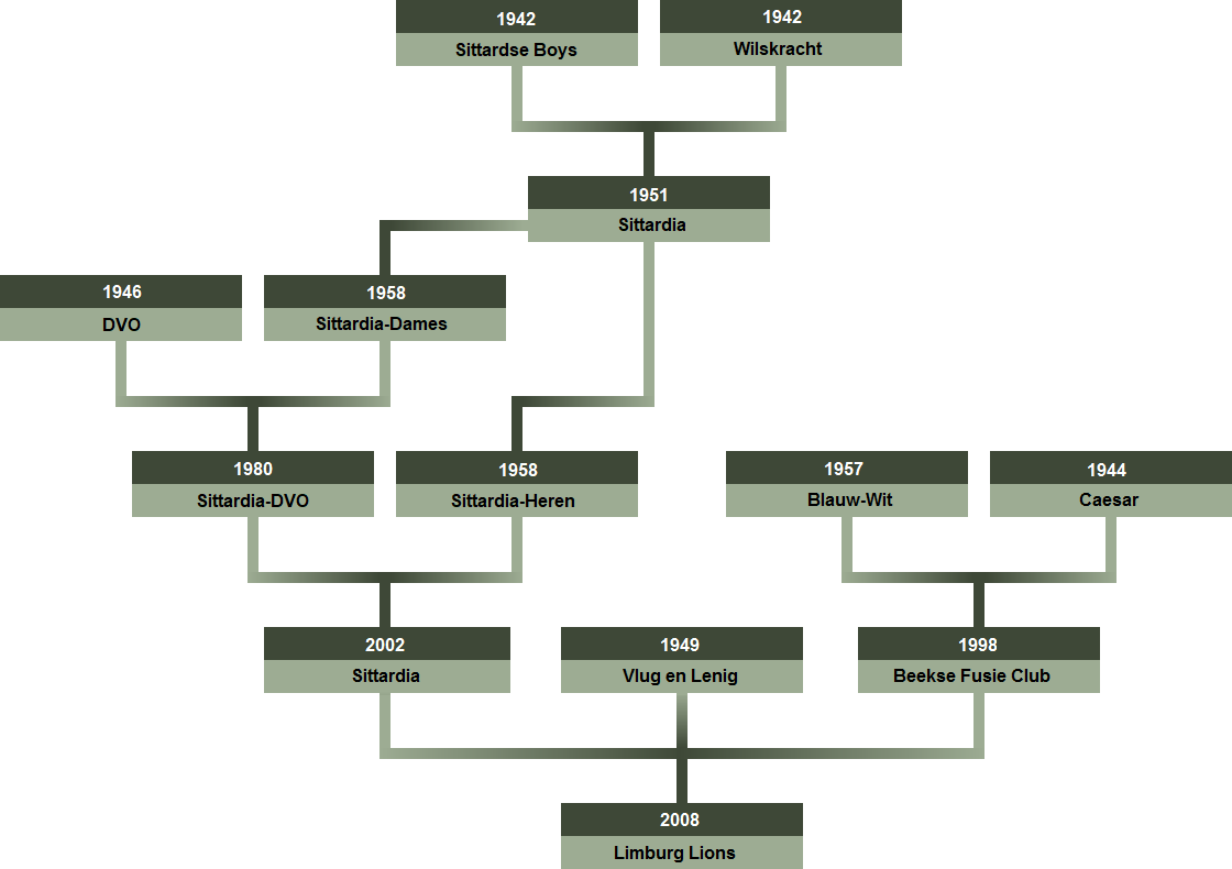 Tijdlijn van Limburg Lions